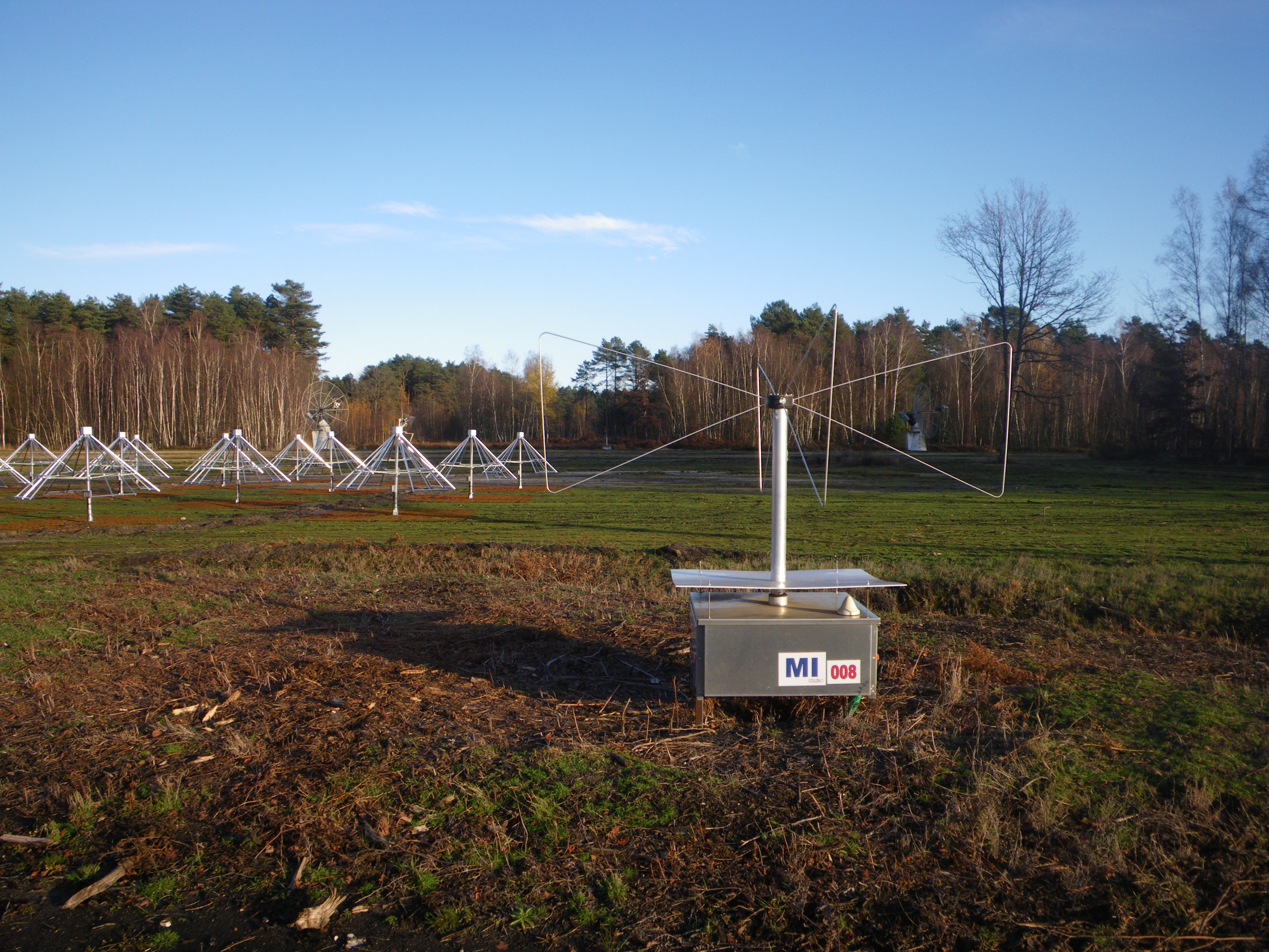 Une station autonome de l'expérience CODALEMA devant un mini-réseau du radio télescope NenuFAR (à gauche) et deux des antennes du radiohéliographe (à l'arrière-plan).